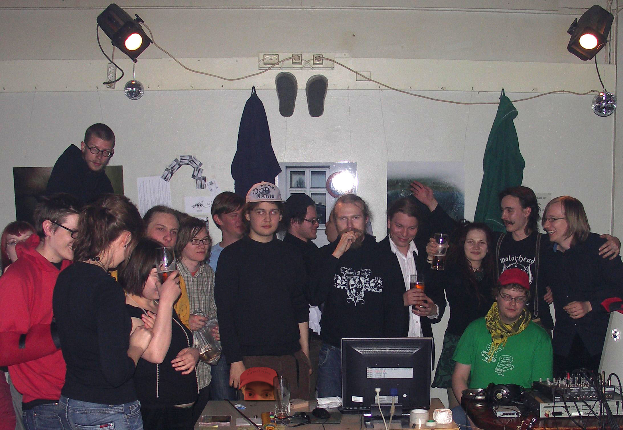 Hear Radio Päivän toimittajat, Jyväskylä